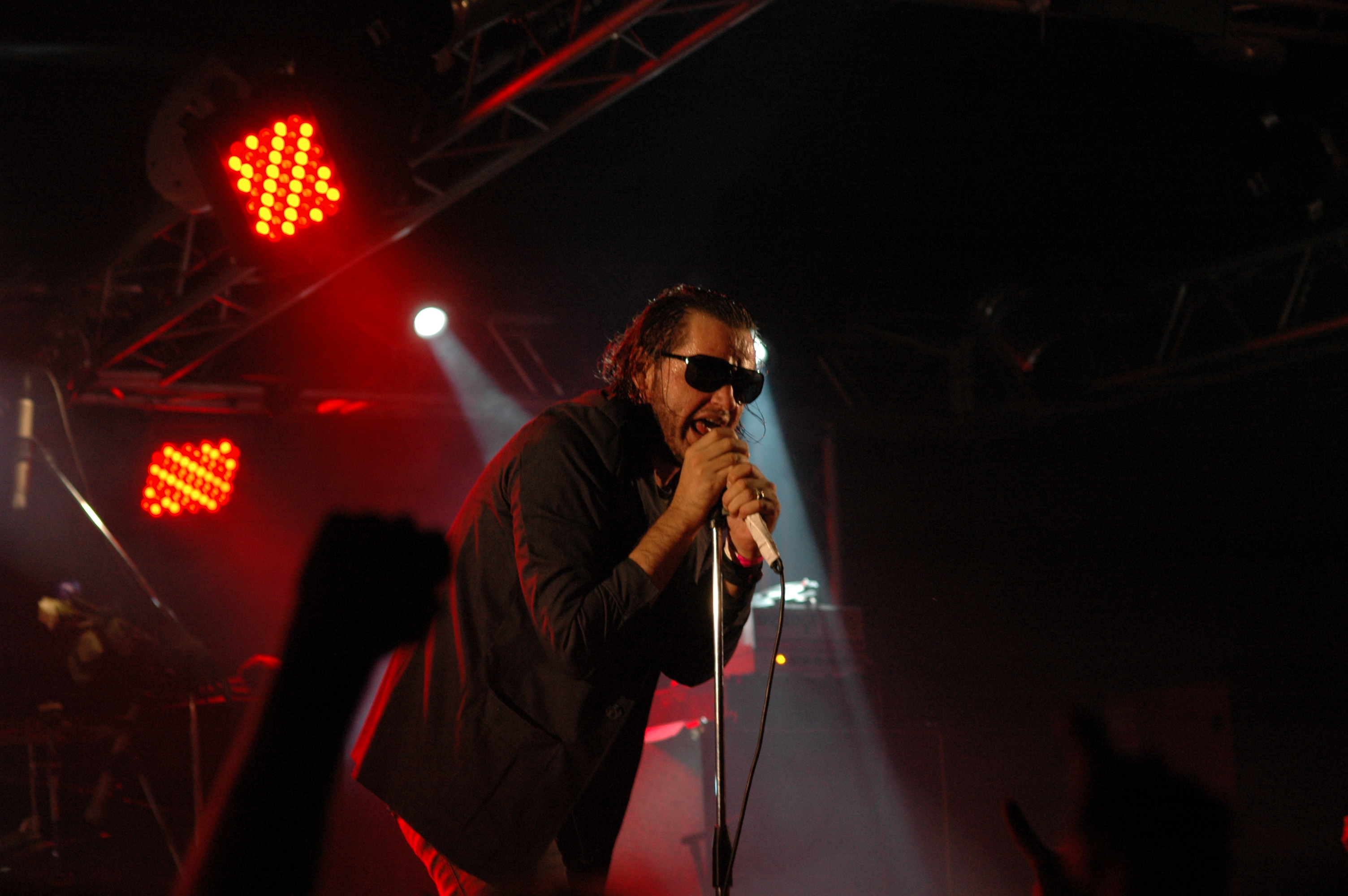 Последние Танки В Париже. Клуб "Зал Ожидания", Санкт-Петербург, Россия. 8 ноября 2012 года